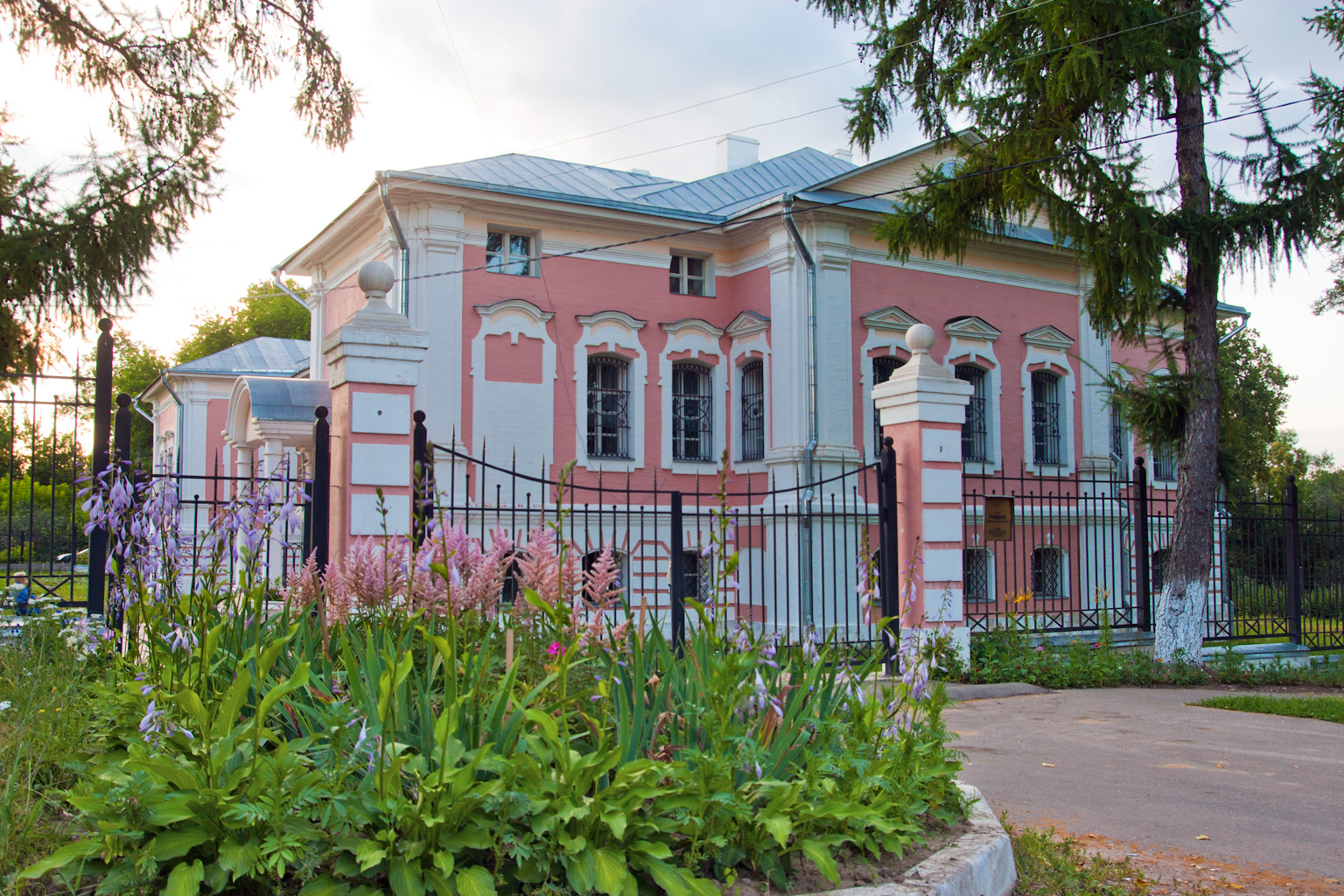 Усадьба Гончаровых-Васильчиковых г.Чехов МО